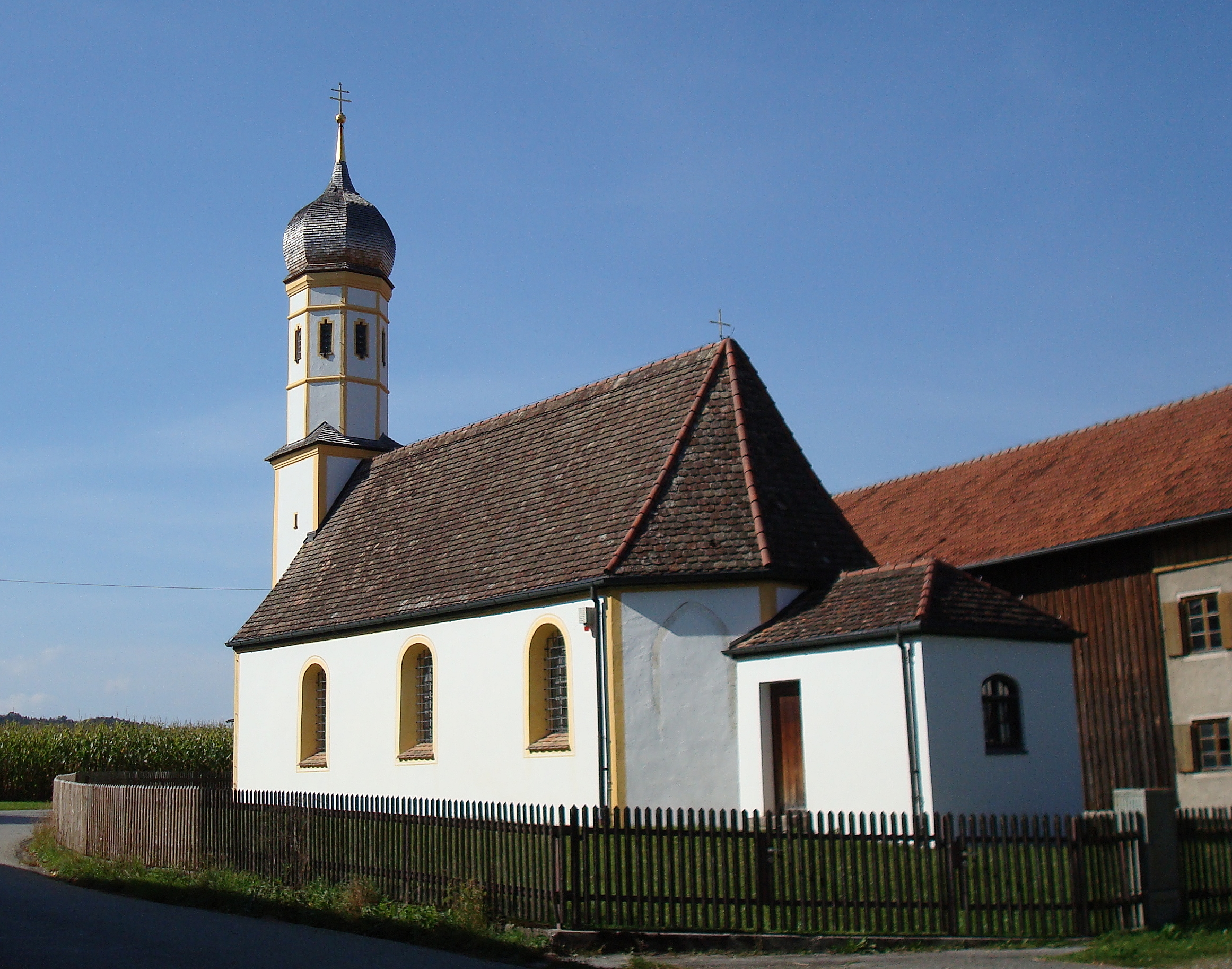 Feldafing, Ortsteil Wieling, Haus Nr. 9, Kapelle St. Nikolaus. Satteldachbau mit Dreiachtelchor und Turm. Der kleine Saalbau mit dreiseitigem Chorschluss stammt aus dem 17./18. Jahrhundert.